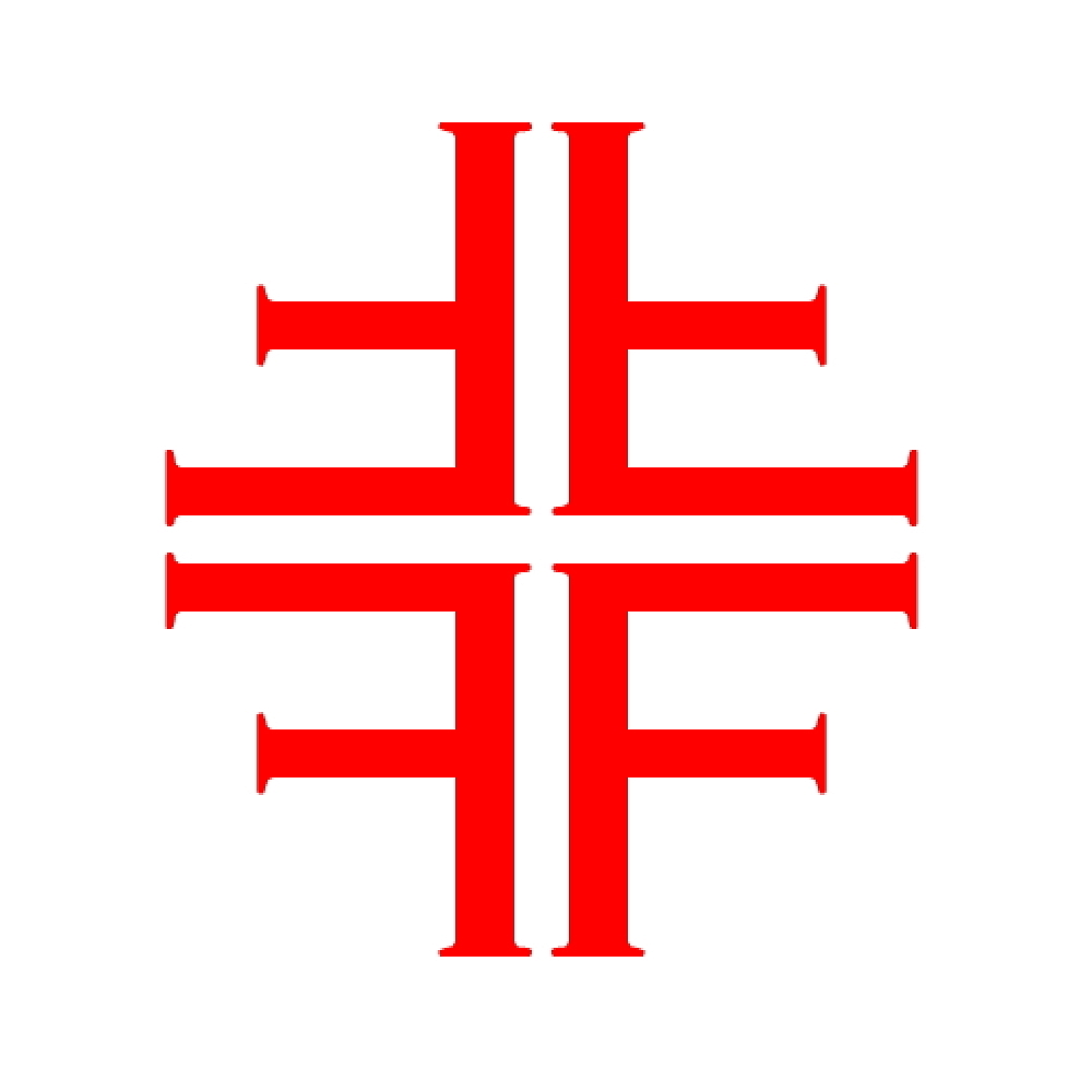 Frisch, fromm, fröhlich, frei – nach Friedrich Ludwig Jahn, Turnerkreuz